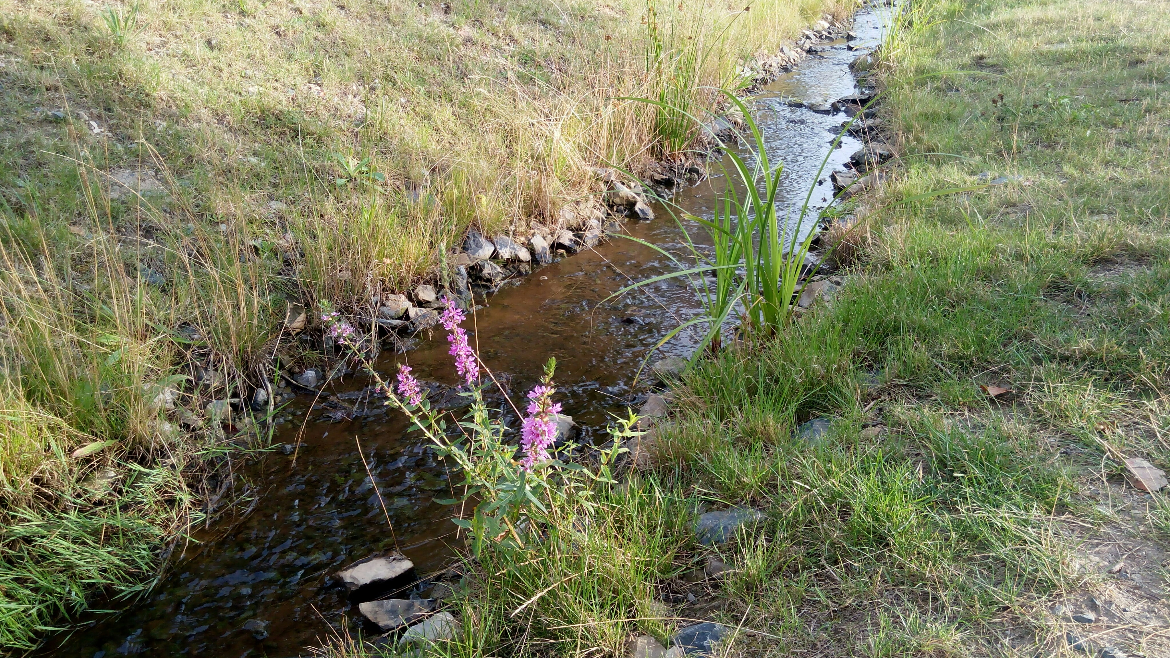 Řepský potok